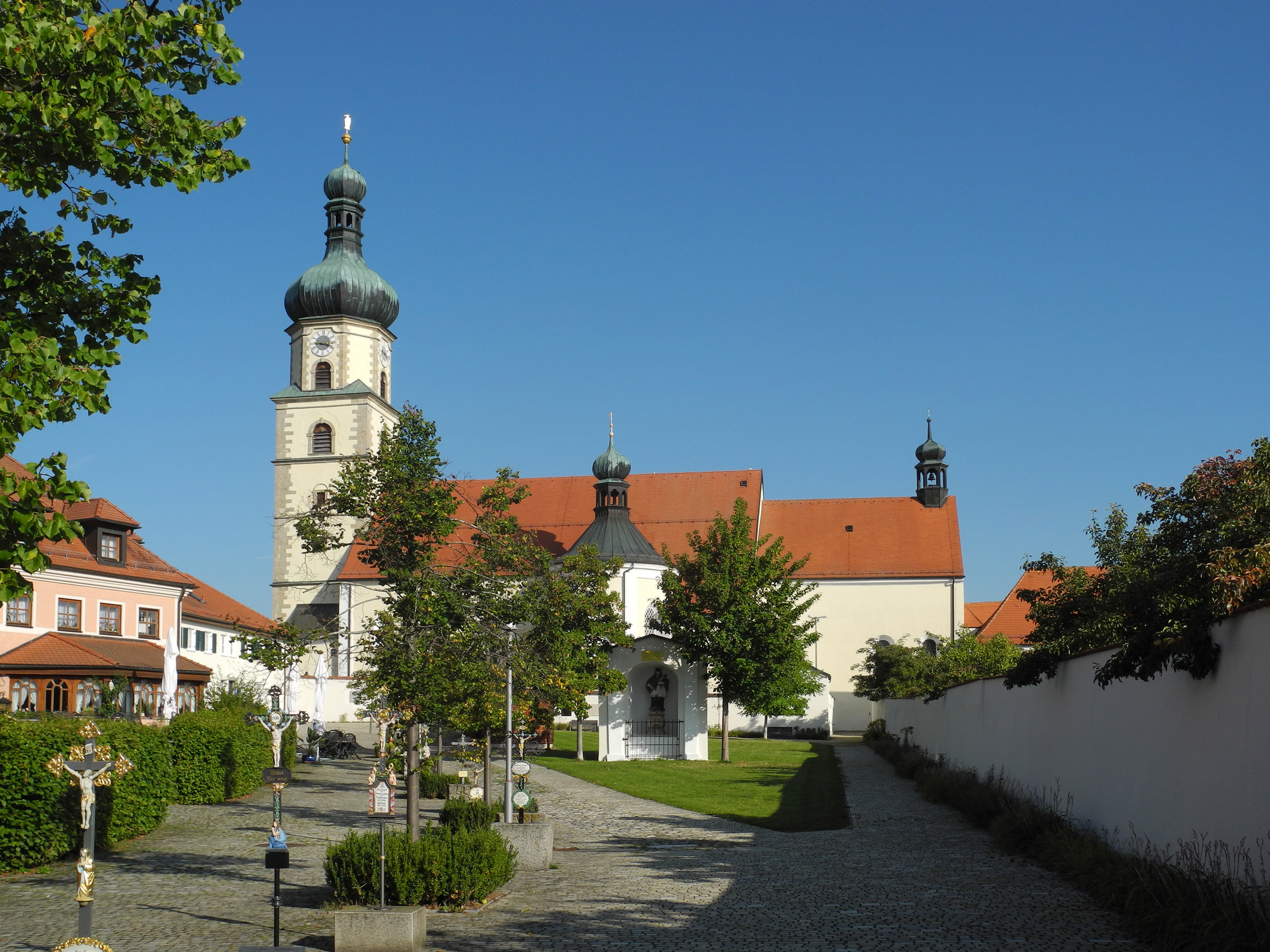 Katholische Wallfahrts- und Pfarrkirche Mariä Geburt in Neukirchen beim Heiligen Blut in der OberpfalzThis is a photograph of an architectural monument.